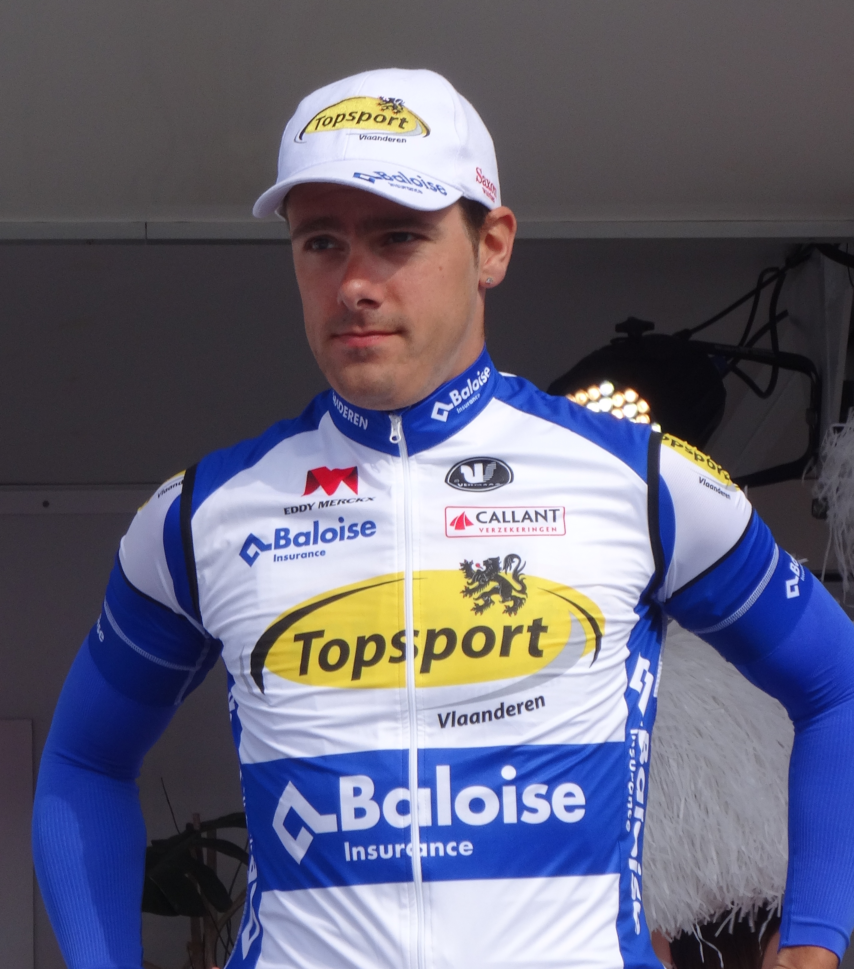 Reportage réalisé le jeudi 17 avril à l'occasion du départ et de l'arrivée du Grand Prix de Denain 2014 à Denain, Nord, Nord-Pas-de-Calais, France.